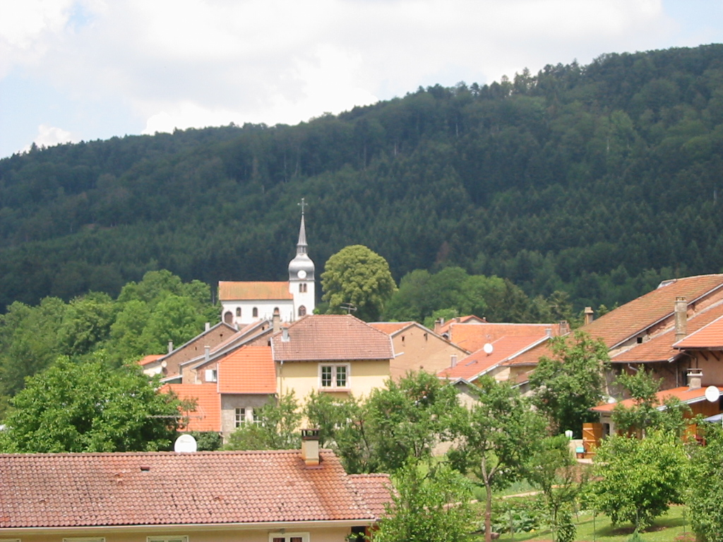 Saint-Jean-d'Ormont Commune du canton de Senones (Vosges) Photo personnelle du 29 juin 2006. Copyright © Christian Amet